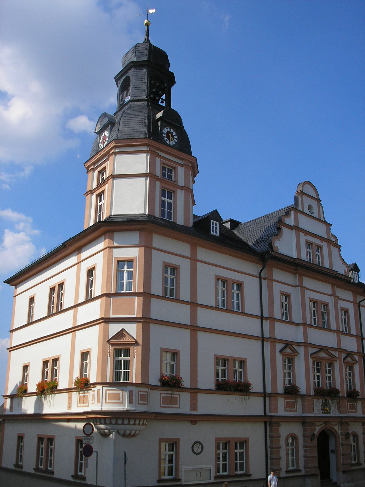 Das Rathaus von Schleiz (Thüringen).